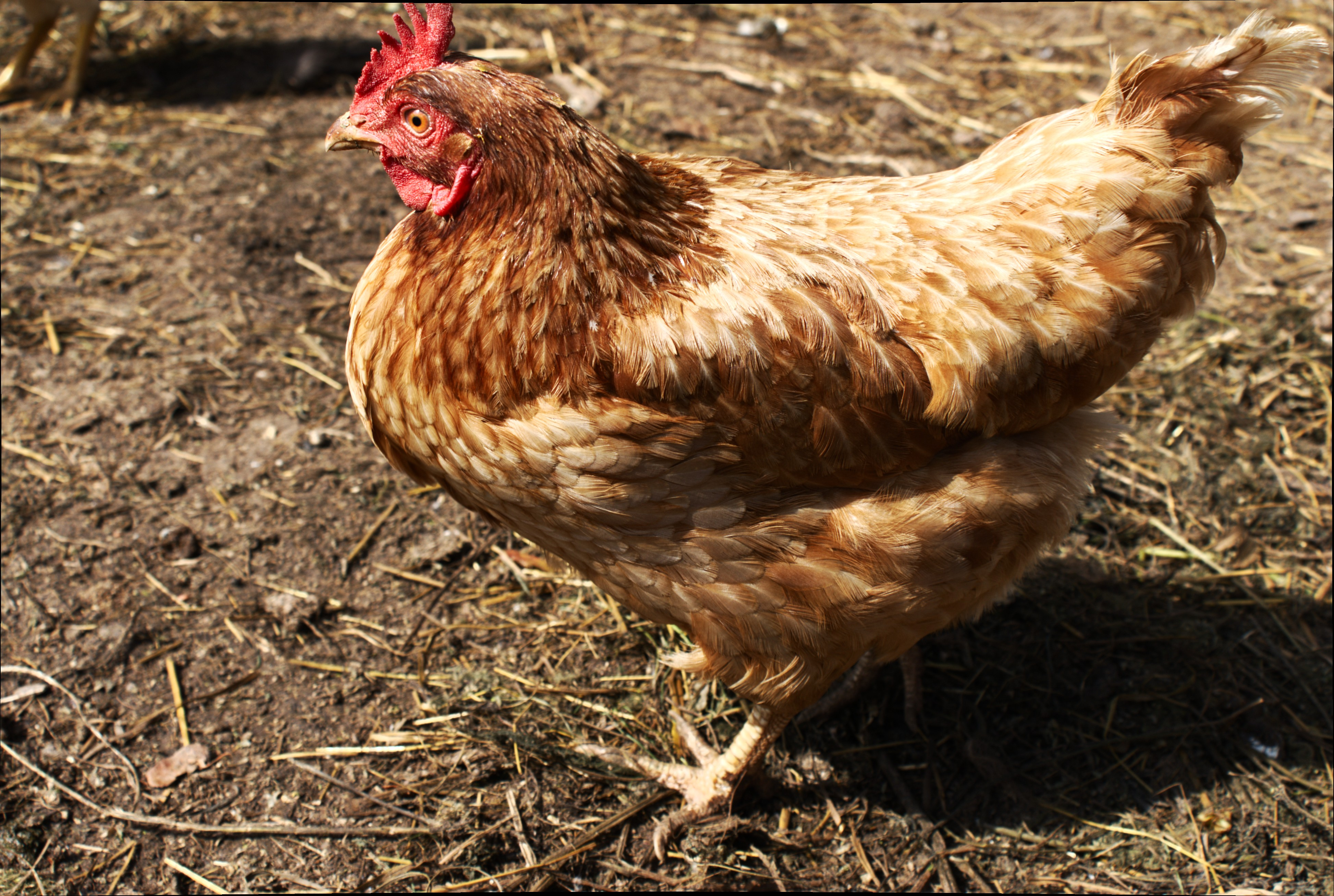 Взрослая курица породы Ломанн Браун.